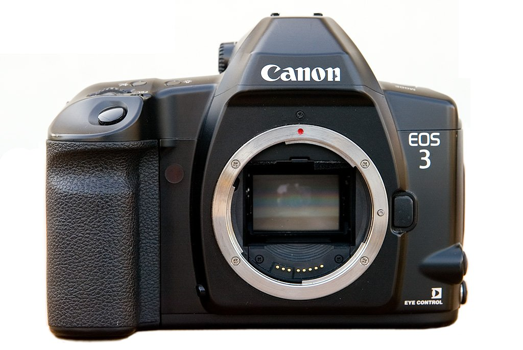 35mm film single lens reflex